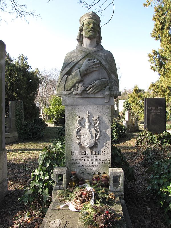 Bitter Illés (Apar, 1868. október 22. – Pécs, 1939. szeptember 26.) cisztercita szerzetes, pedagógus sírja Budapesten. Kerepesi temető: 34-1-41 [szobrász: Bory Jenő]